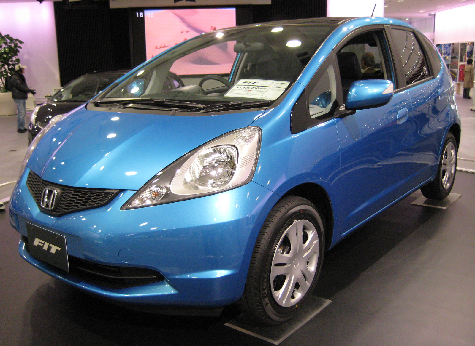 2007 Honda Fit in Honda Welcome Plaza